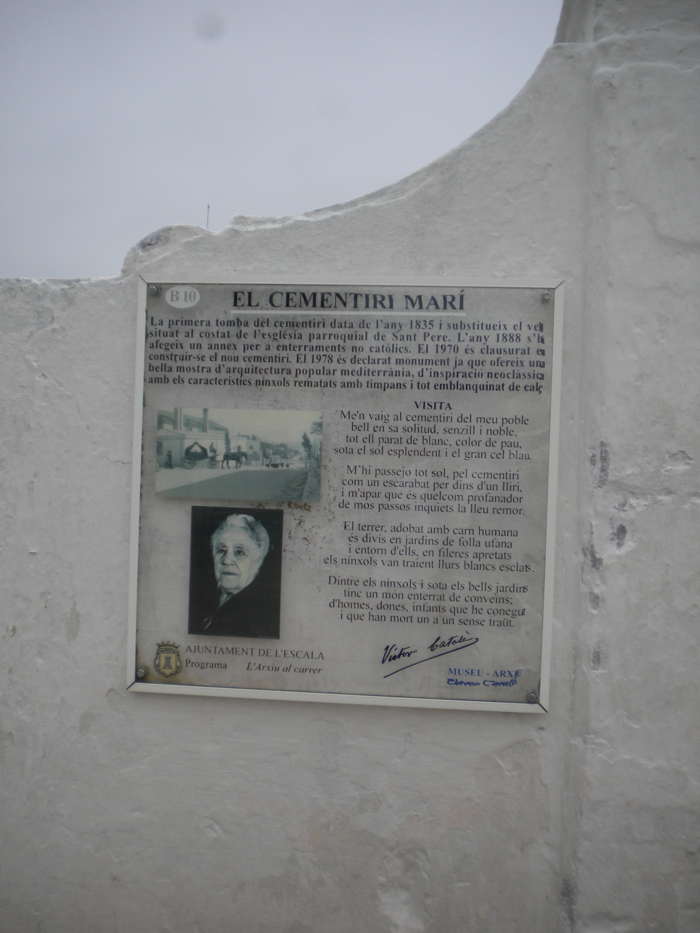 Plafó informatiu del Cementiri Marí (o Vell) de l'Escala, homenatjant a Víctor Català.